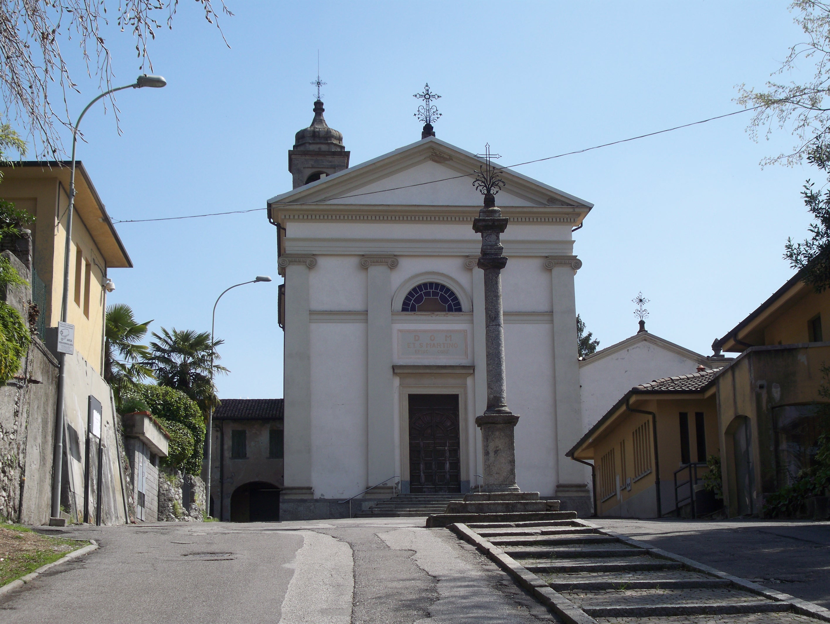 Parrocchia di San Martino, Orsenigo, Como, Italia, 18 aprile 2018